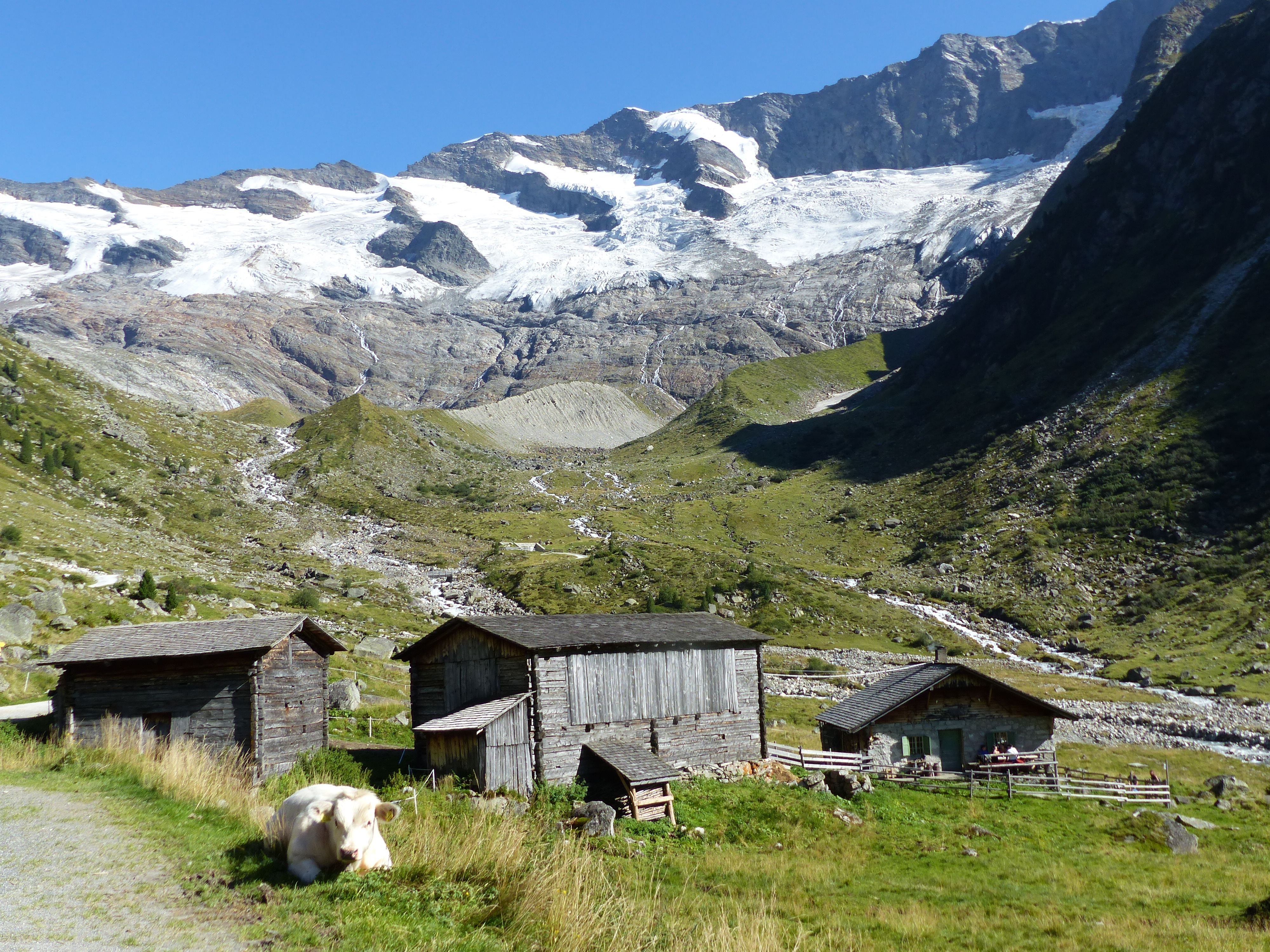 Krimmler Kees mit Innerer Keesalm